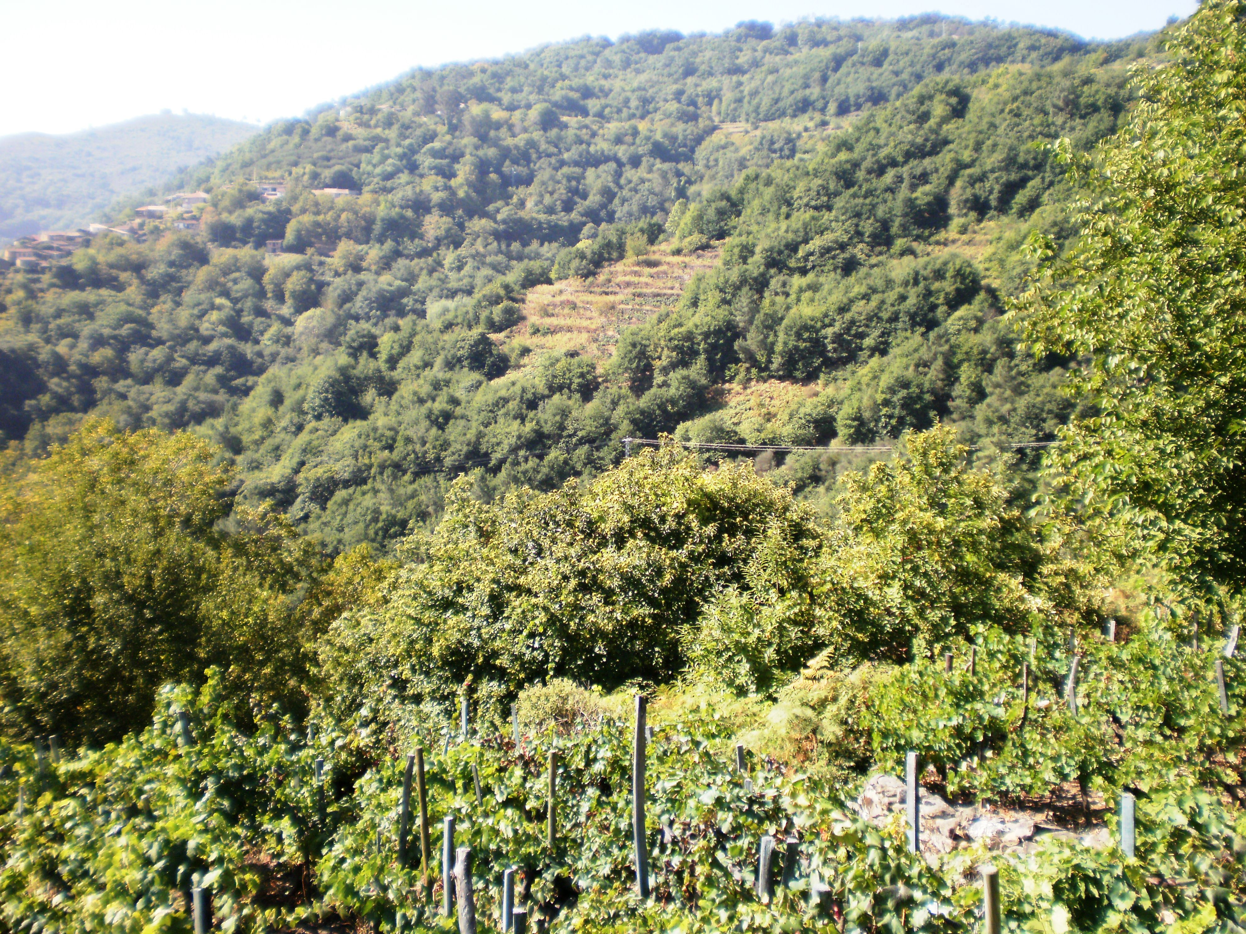 Temes, Carballedo